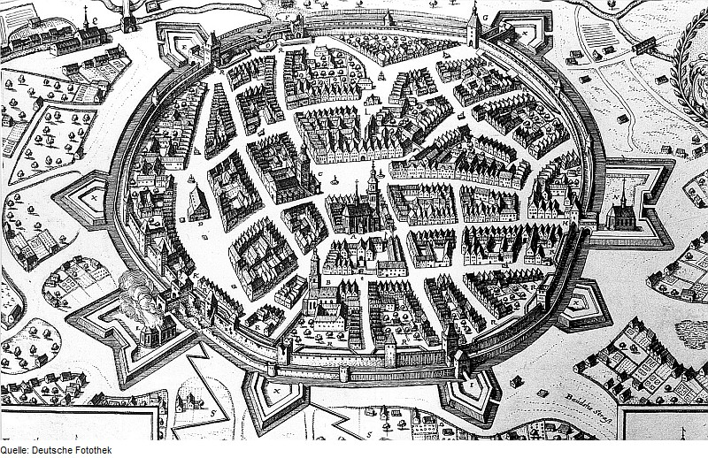 Original image description from the Deutsche Fotothek Zittau. Vogelschau, Ausschnitt aus: Die Stadt Zittau 1643 (Sign.: VIII 129)